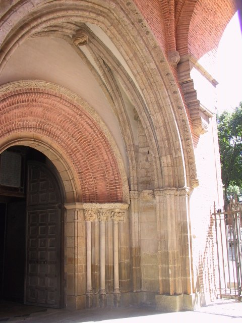 Portail de la cathédrale de Pamiers (Ariège, France) - briques toulousaines.